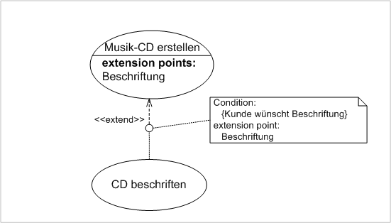 Anwendungsfall (UML2) - Beispiel 3